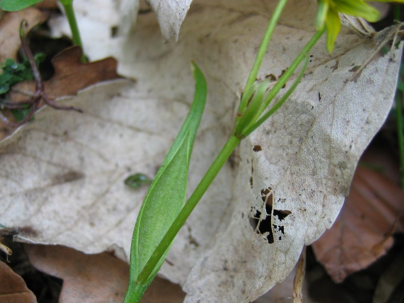 Blatt des Scheiden-Gelbsterns Gagea spathacea, Pölchow bei Rostock